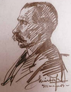 Németh Gyula magyar nyelvész, akadémikus és turkológus.